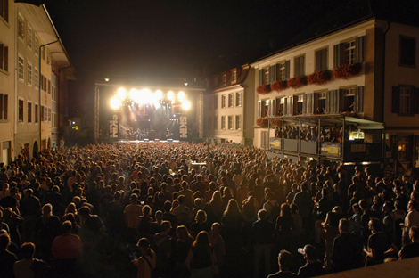 Bühne der Winterthurer Musikfestwochen in der Steinberggasse während dem Konzert von Skin im Jahr 2005